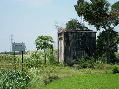 Eks Halte Pulorejo